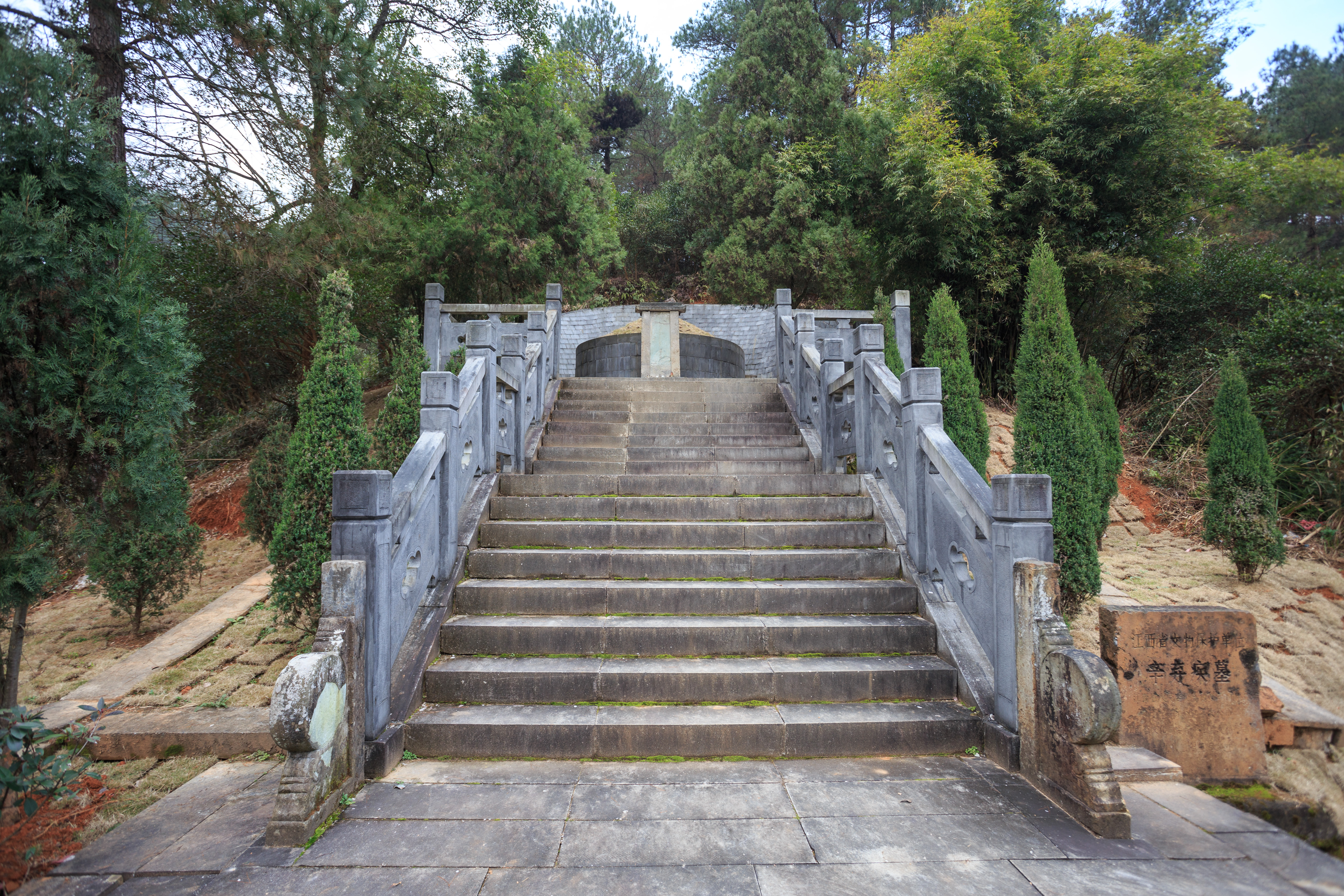 辛弃疾墓